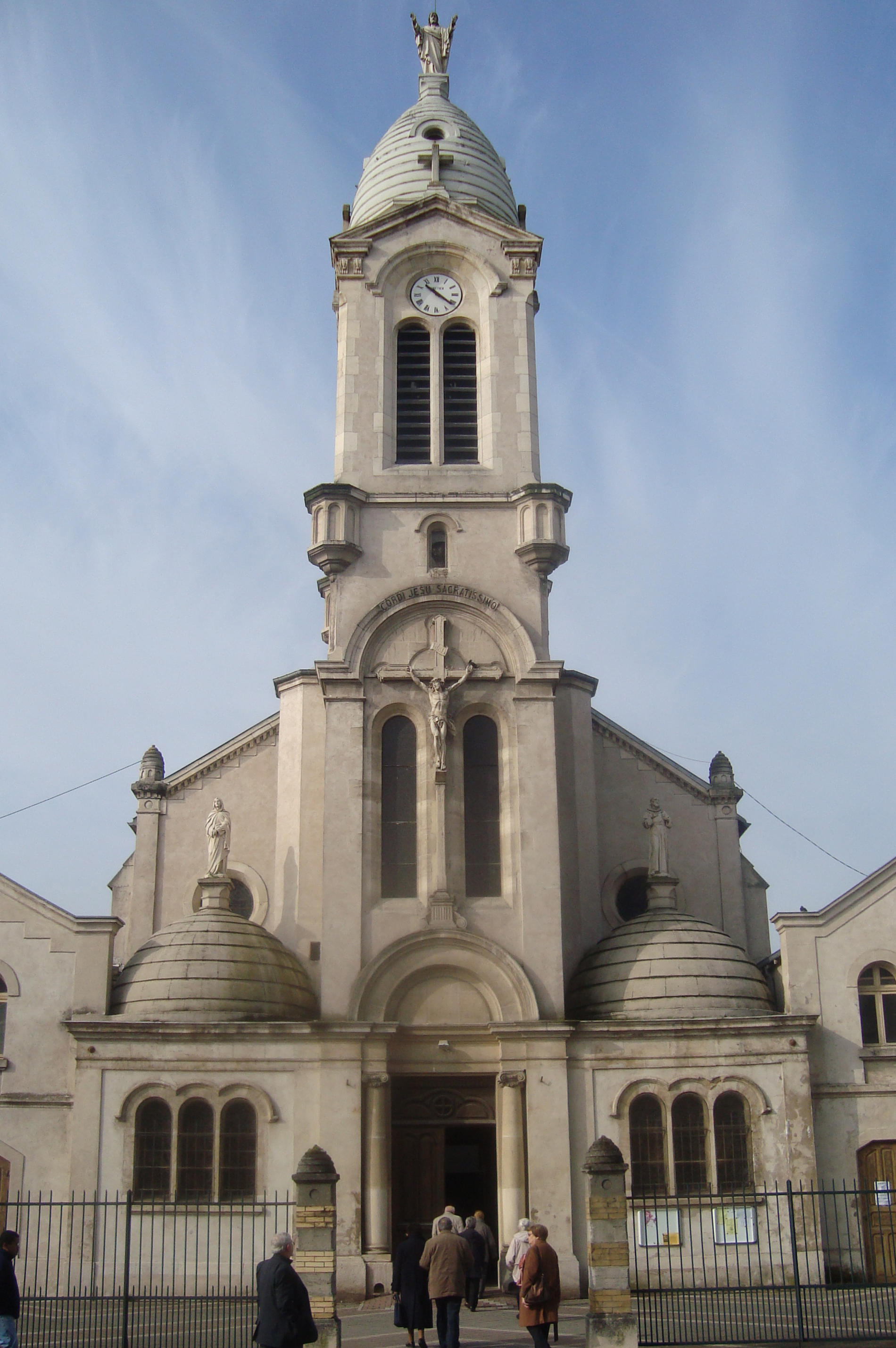 Sacré coeur 1903